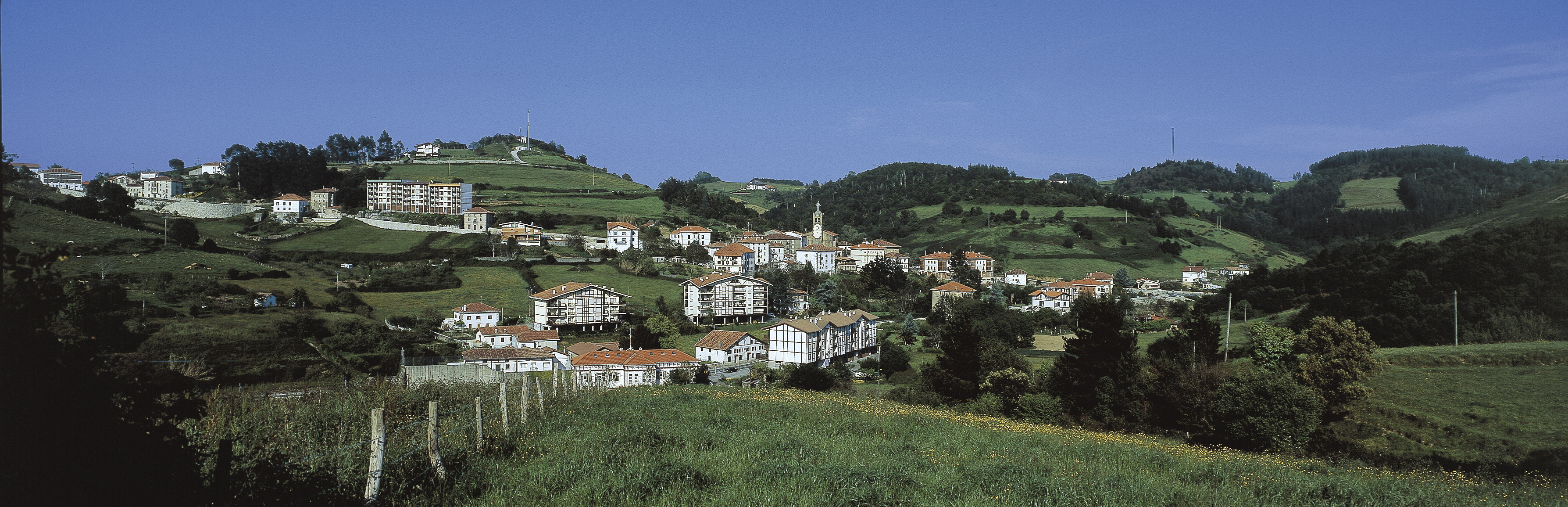 Ibarrangelu. Bizkaia, Euskal Herria.